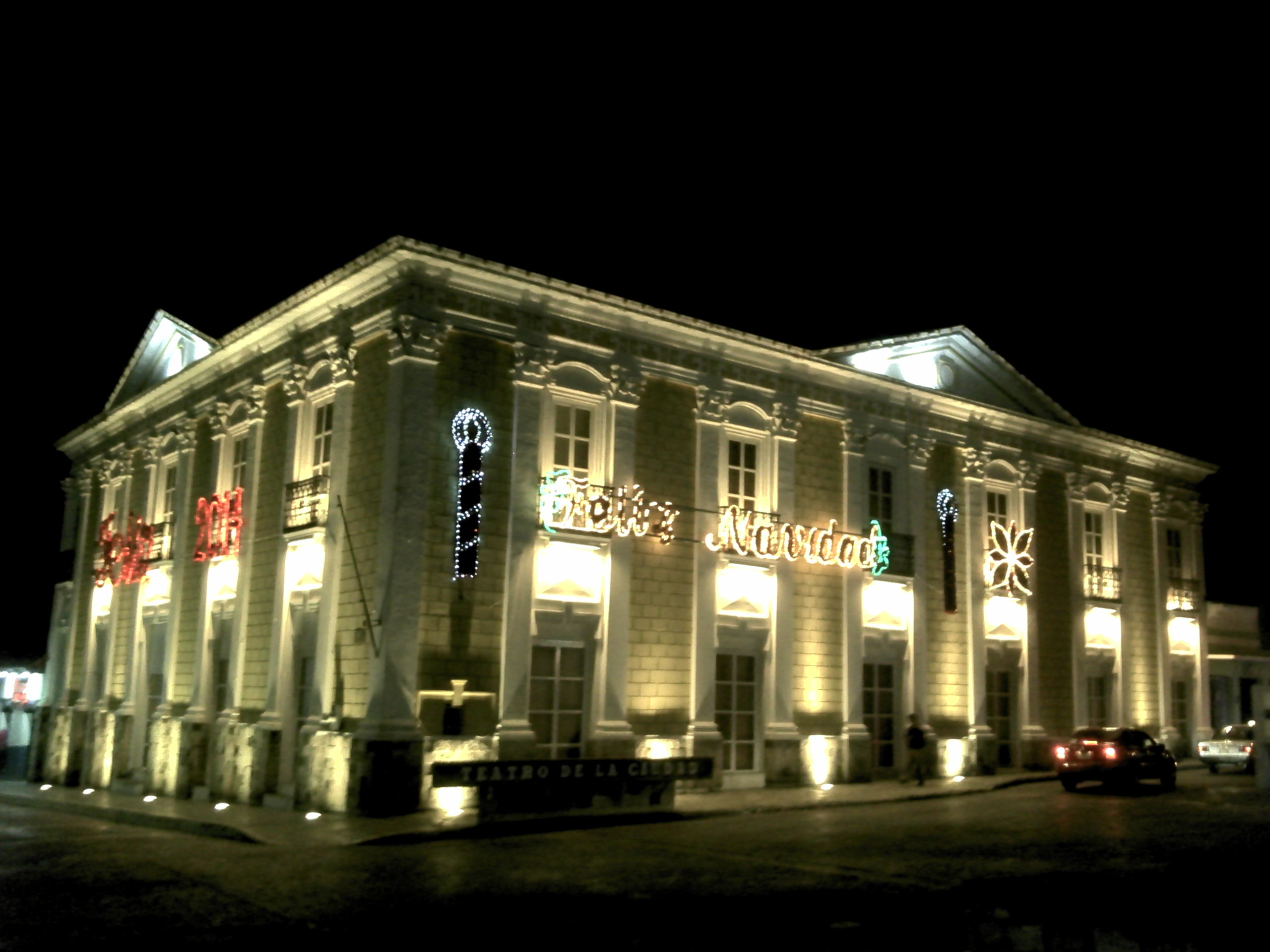 teatro de la ciudad junchavin